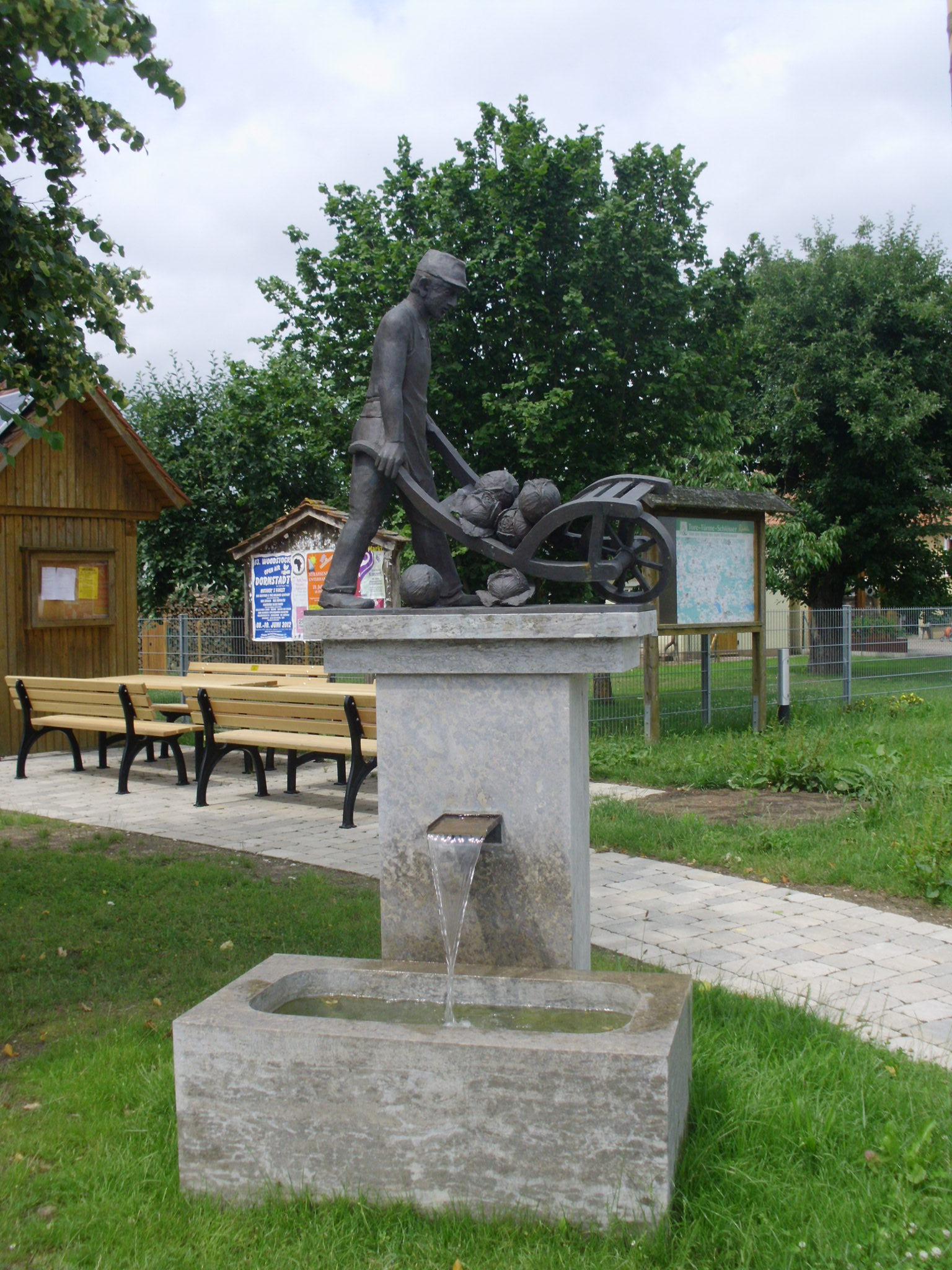 Heglau, Ortsteil von Merkendorf (Mittelfranken), Dorfplatz mit Krautbrunnen